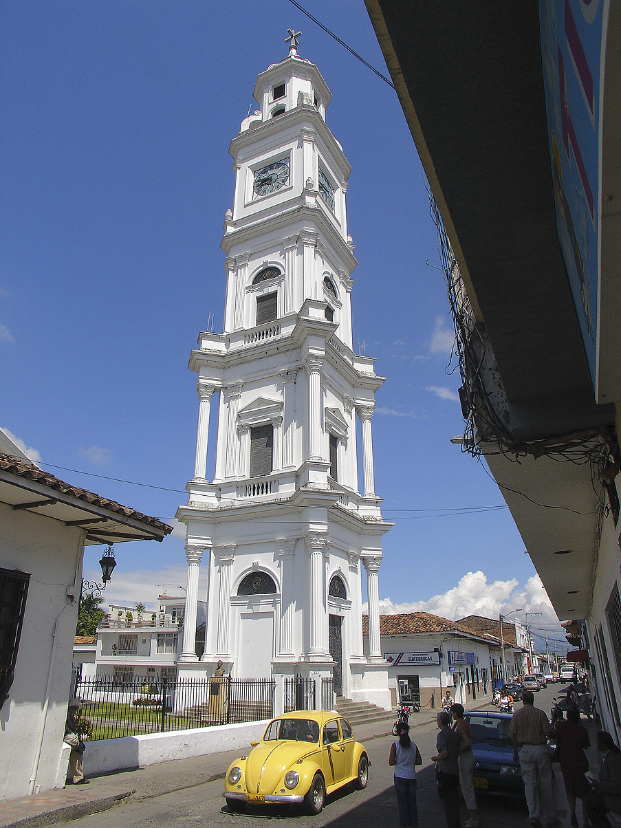 Catedral en Cartago Valle del Cauca Colombia